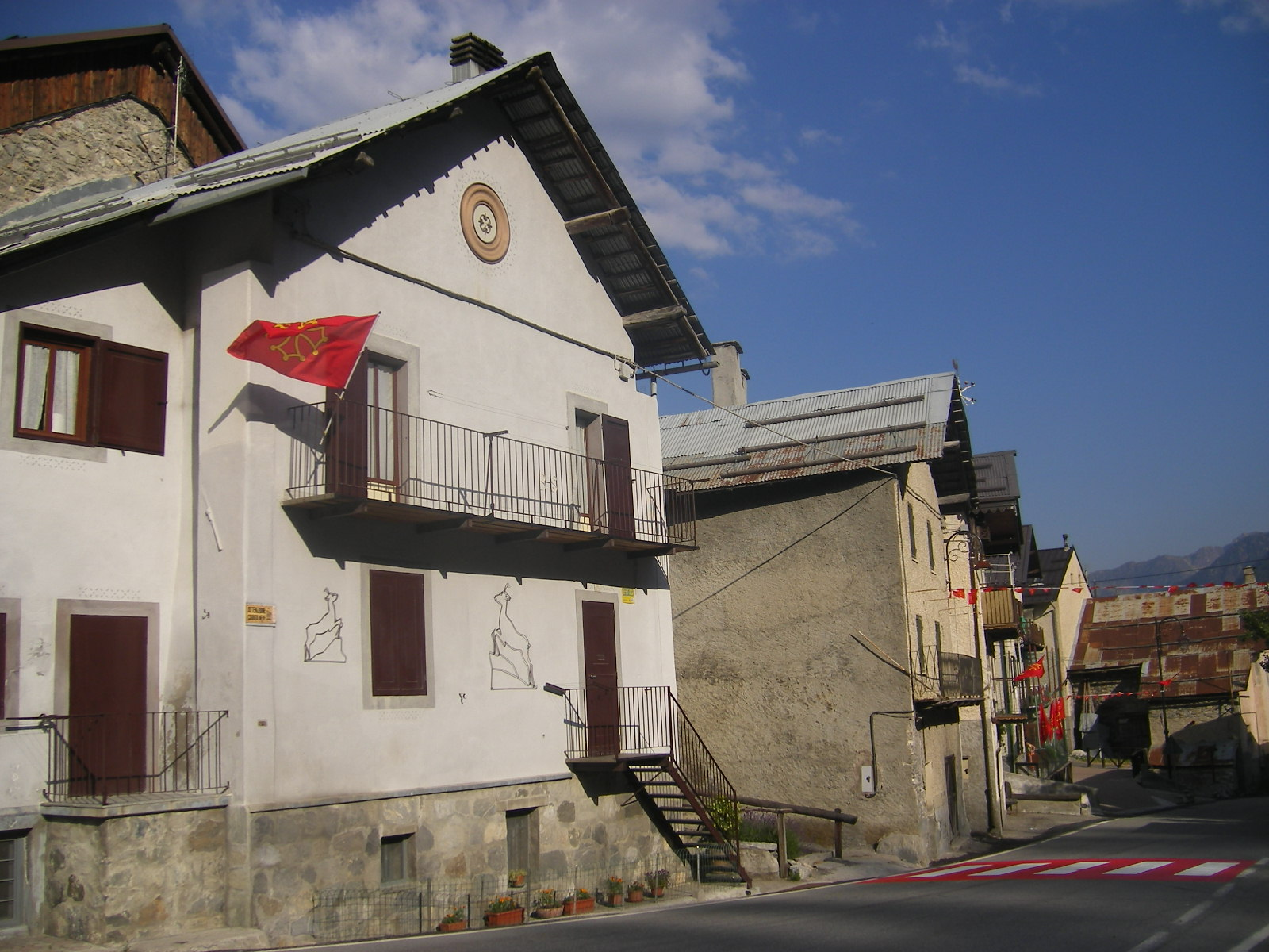 Bersezio (Argentera municipality)